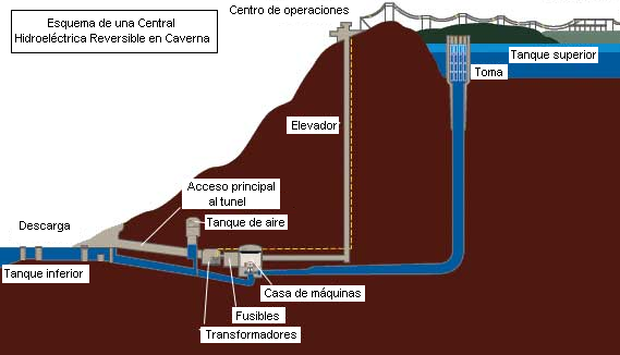 Traducción de carteles de figura igual (en ingles)